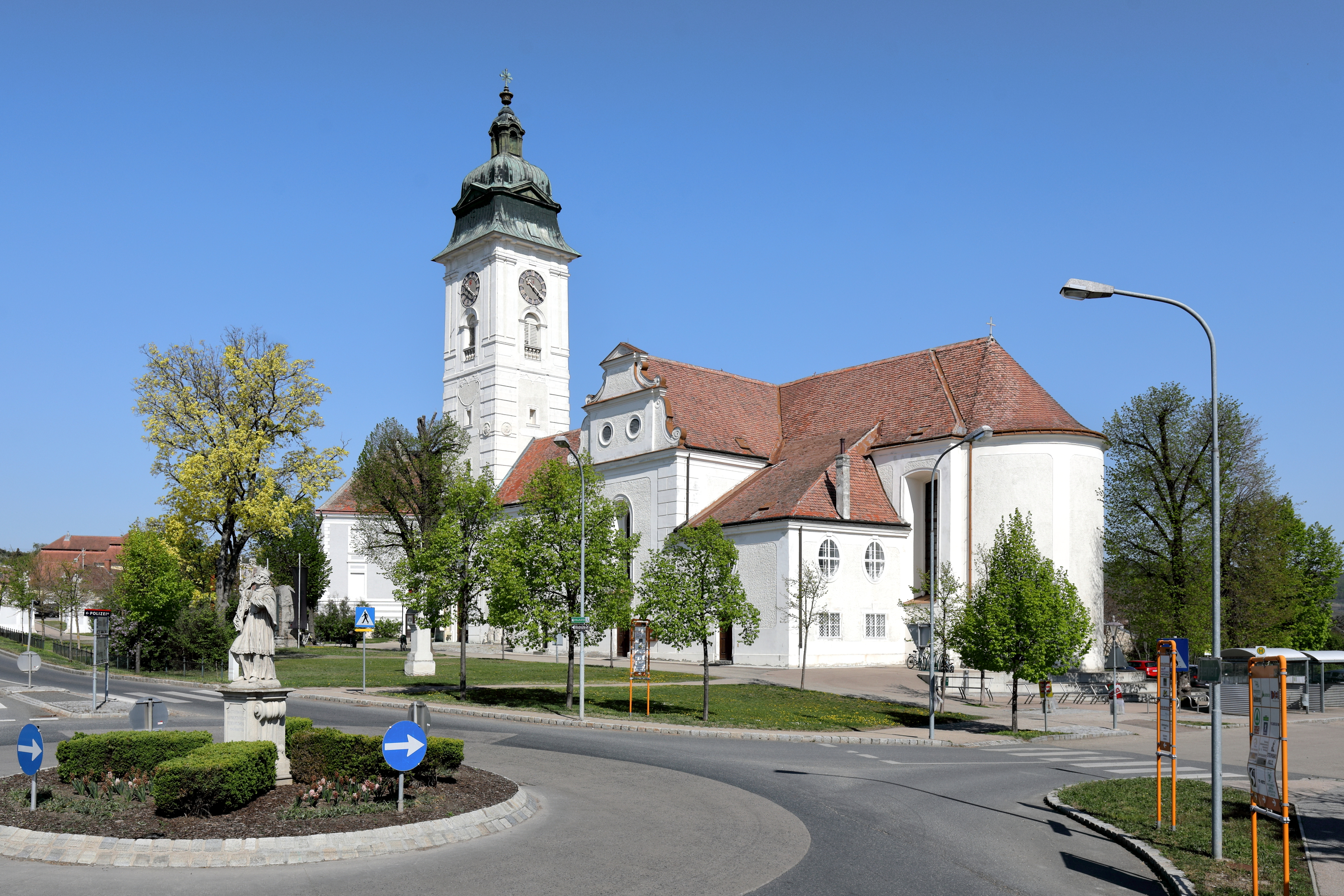 Südostansicht der Stadtpfarrkirche St. Stephan in der niederösterreichischen Stadt Retz.Ein barocker Bau, der 1721/28 unter teilweiser Einbindung der Bausubstanz des Vorgängerbaues errichtet wurde. Der barocke Westturm wurde bereits 1701/03 errichtet und 1733 aufgestockt. Der ehemals um die sehr große Kirche angelegte Friedhof wurde Ende des 19. Jahrhunderts zu einem Kirchenpark umgestaltet.